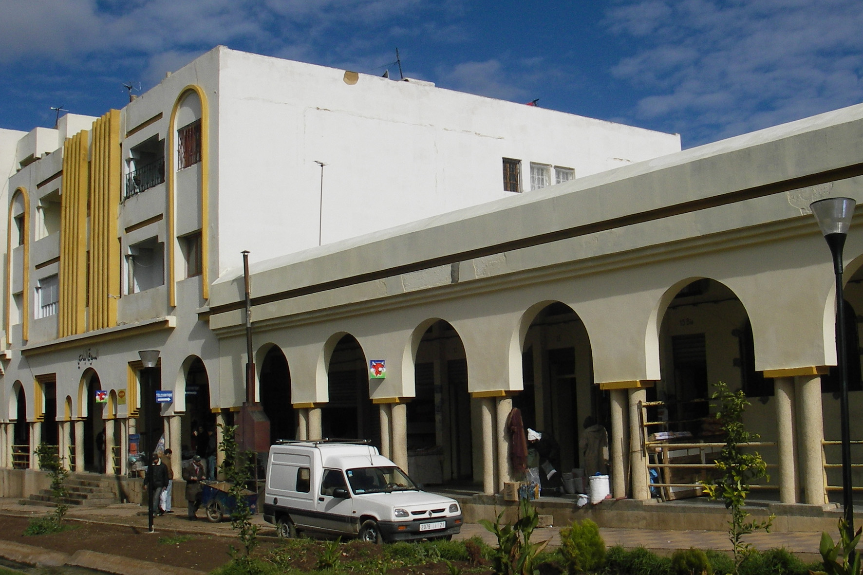 Marché couvert d'El Hajeb, avnue Hassan II (Maroc)